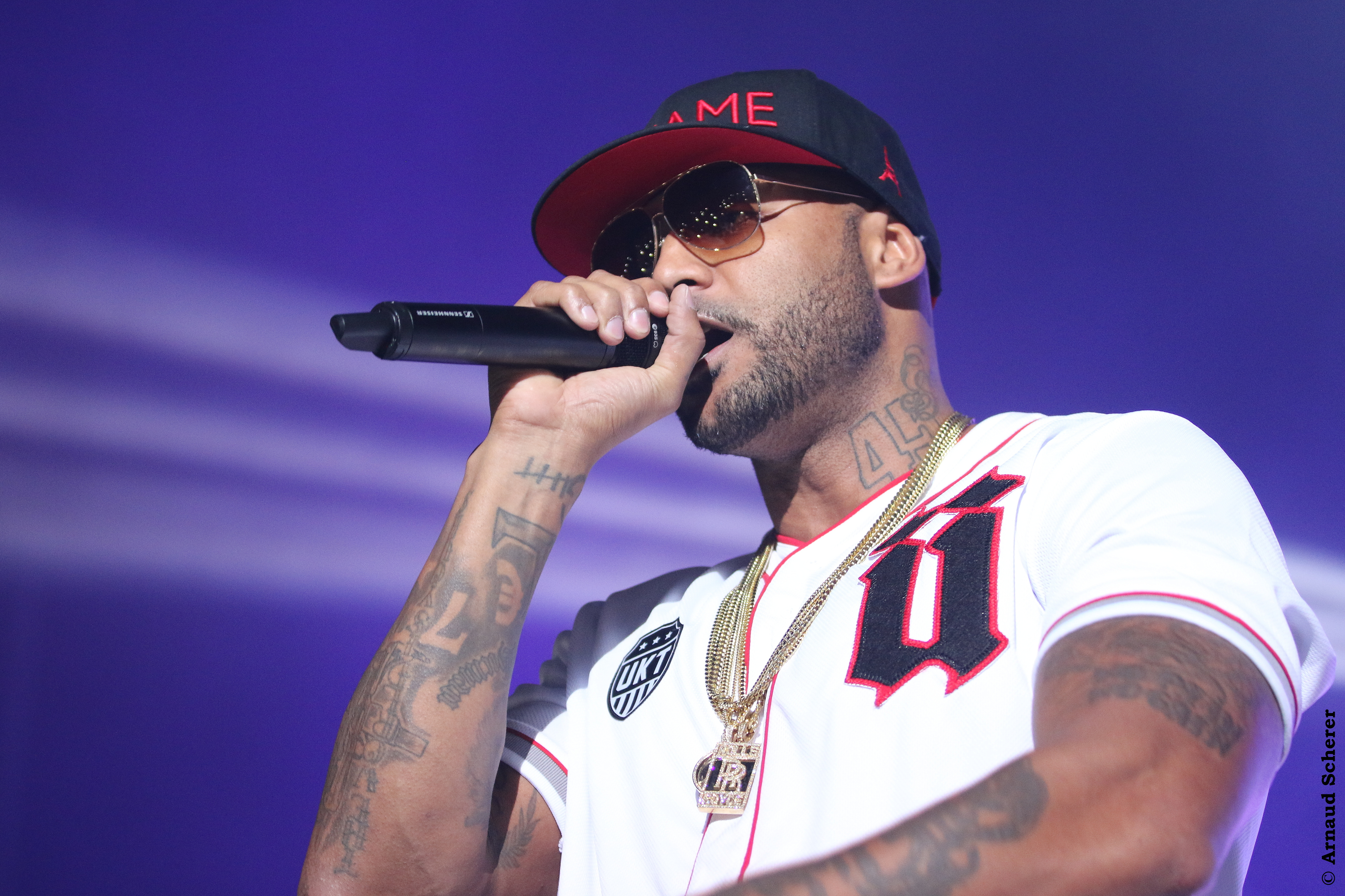 Booba lors d'un concert à la Rockhal (Luxembourg) le 15 Mars 2014 Photographe